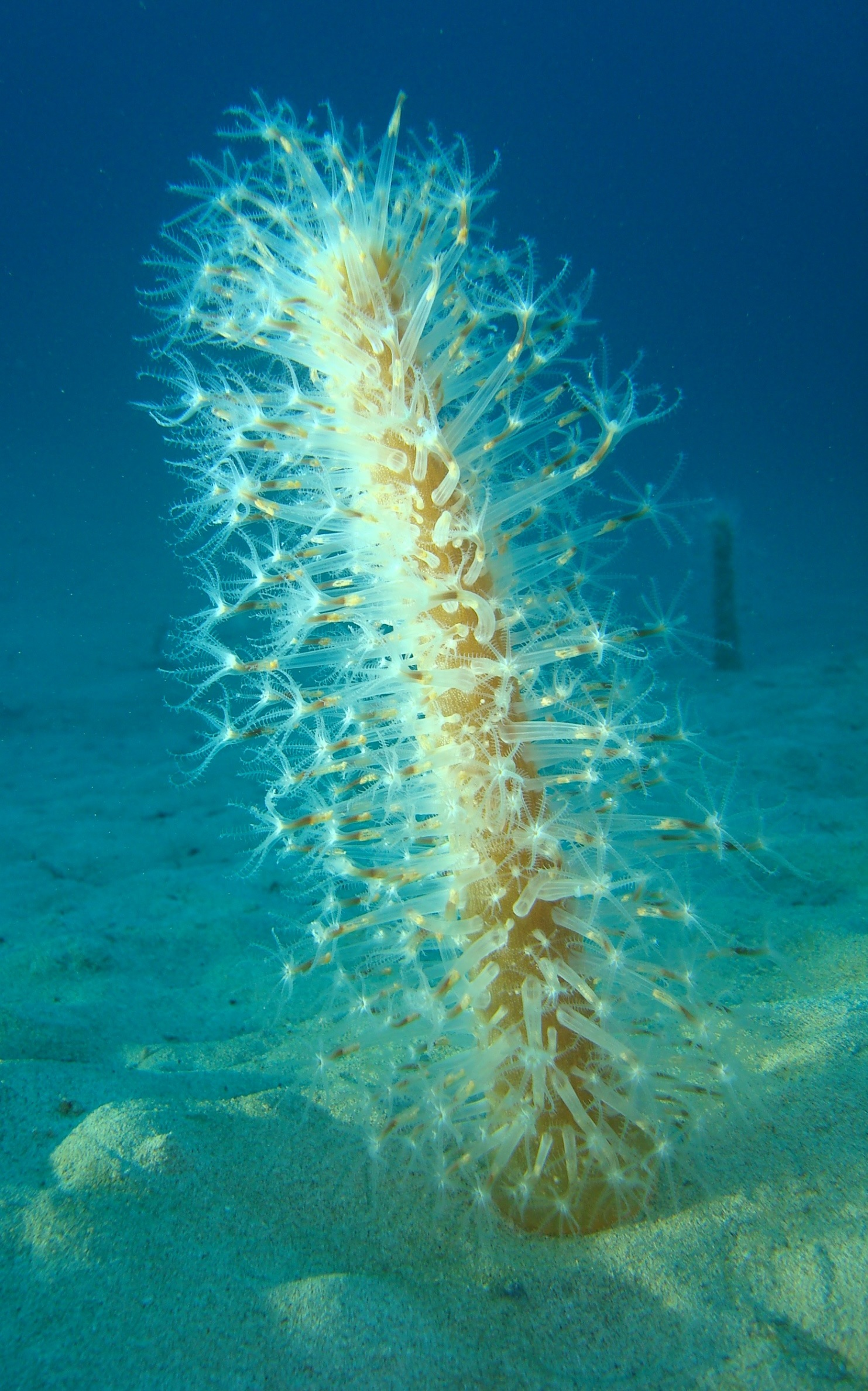 Veretillum cynomorium - Runde Seefeder